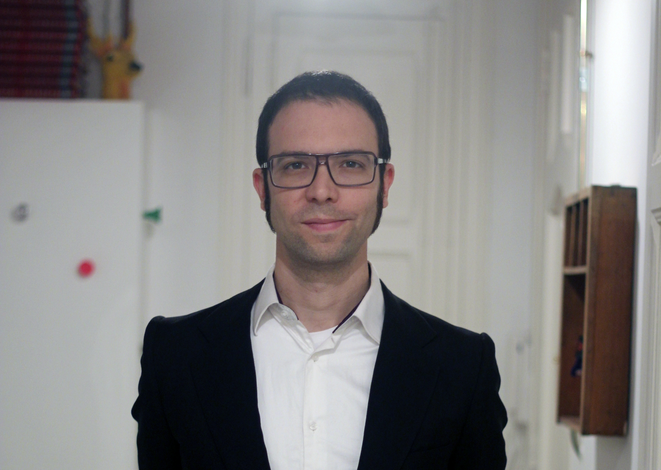 Albert Forns i Canal